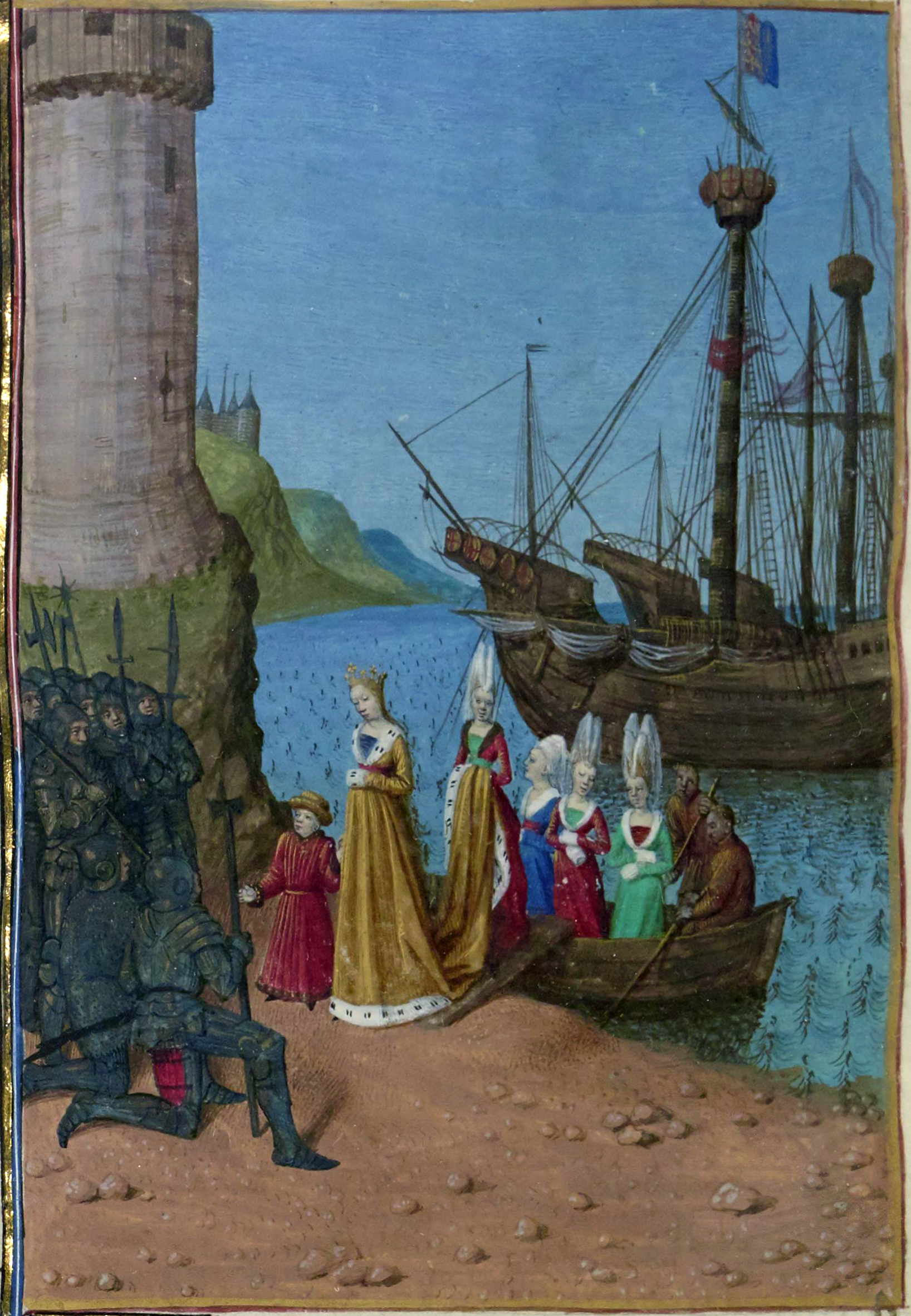 Retour d'Isabelle de France en Angleterre. Grandes Chroniques de France, enluminées par Jean Fouquet, Tours, vers 1455-1460 Paris, BnF, département des Manuscrits, Français 6465, fol. 338v. (Livre de Charles IV le Bel). Débarquant au port d'Harwick, Isabelle de France, épouse d'Édouard II d'Angleterre, accompagnée de son fils Édouard, s'adresse aux soldats venus l'appréhender.